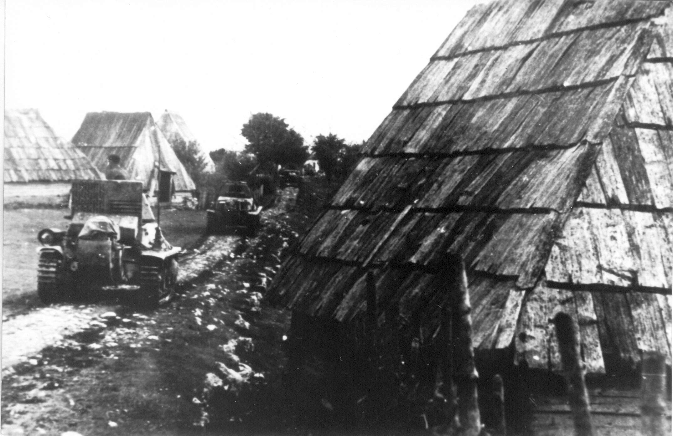 Srpskohrvatski / српскохрватски: 369. legionarska "vražija" divizija u selu Gotovuša, Pljevlja, maj-jun, 1943. god.